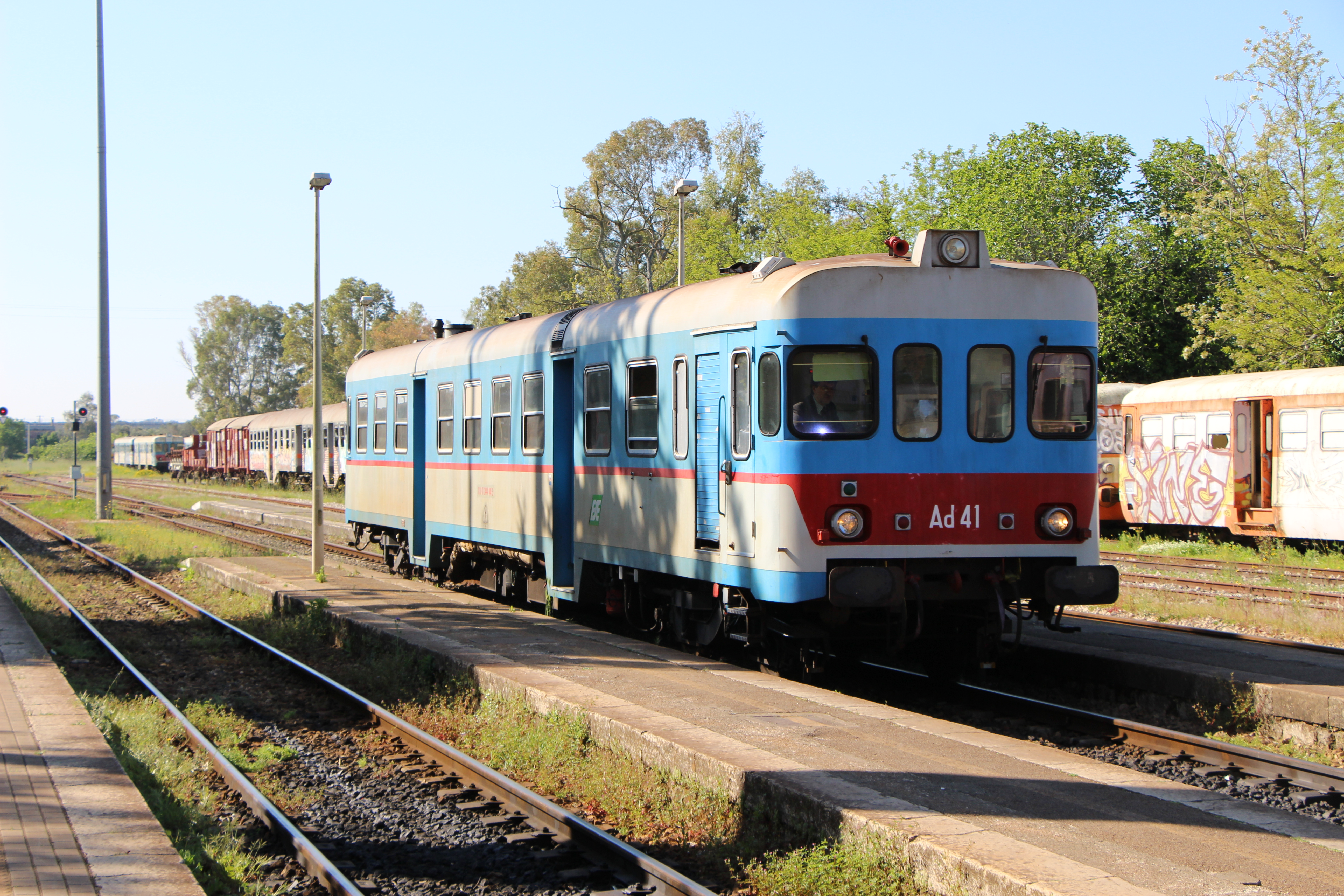 Ad 41 entrando in Stazione di Zollino in aprile 2017. Treno delle ore 9:24 direzione Lecce